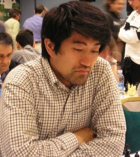 Toshiyuki Moriuchi